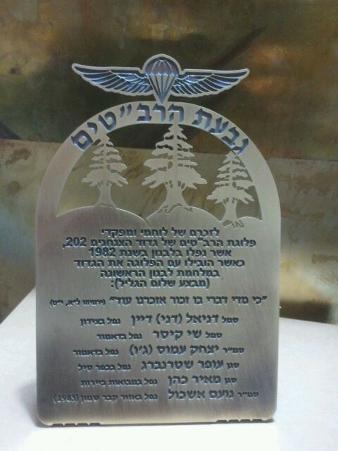 מגן פלוגת הרב"טים